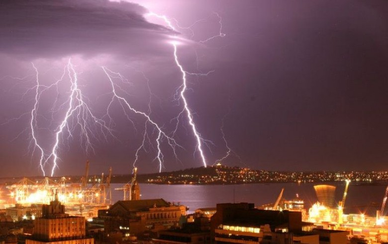 Montevideo, tormenta electrica sobre la ciudad en abril del 2012. Al fondo, el cerro de Montevideo